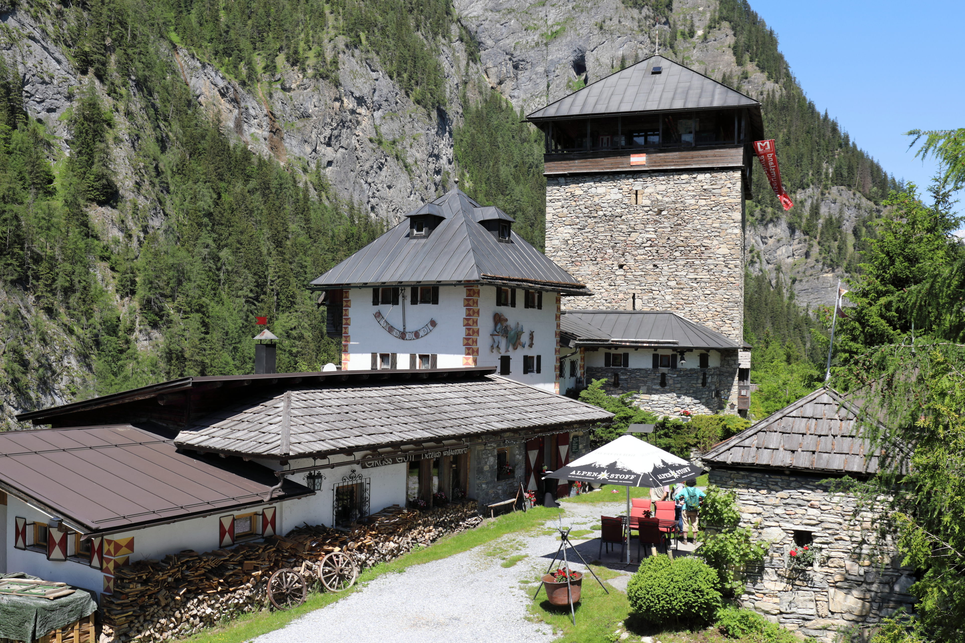 Südansicht der Burg Klammstein in der Salzburger Gemeinde Dorfgastein.Die Burg wurde im 13. Jahrhundert auf einem etwa 30 m hohen Felsen südseitig der Gasteiner Klamm bzw. am Taleingang des Gasteinertales errichtet. Ab dem 16. Jahrhundert verfiel die Burg und das Mauerwerk wurde teilweise als Steinbruch für andere Bauten verwendet. 1972 kaufte ein Adolf Ferner die Ruine den Österreichischen Bundesforsten ab und sanierte die Burg bzw. baute sie teilweise wieder auf.